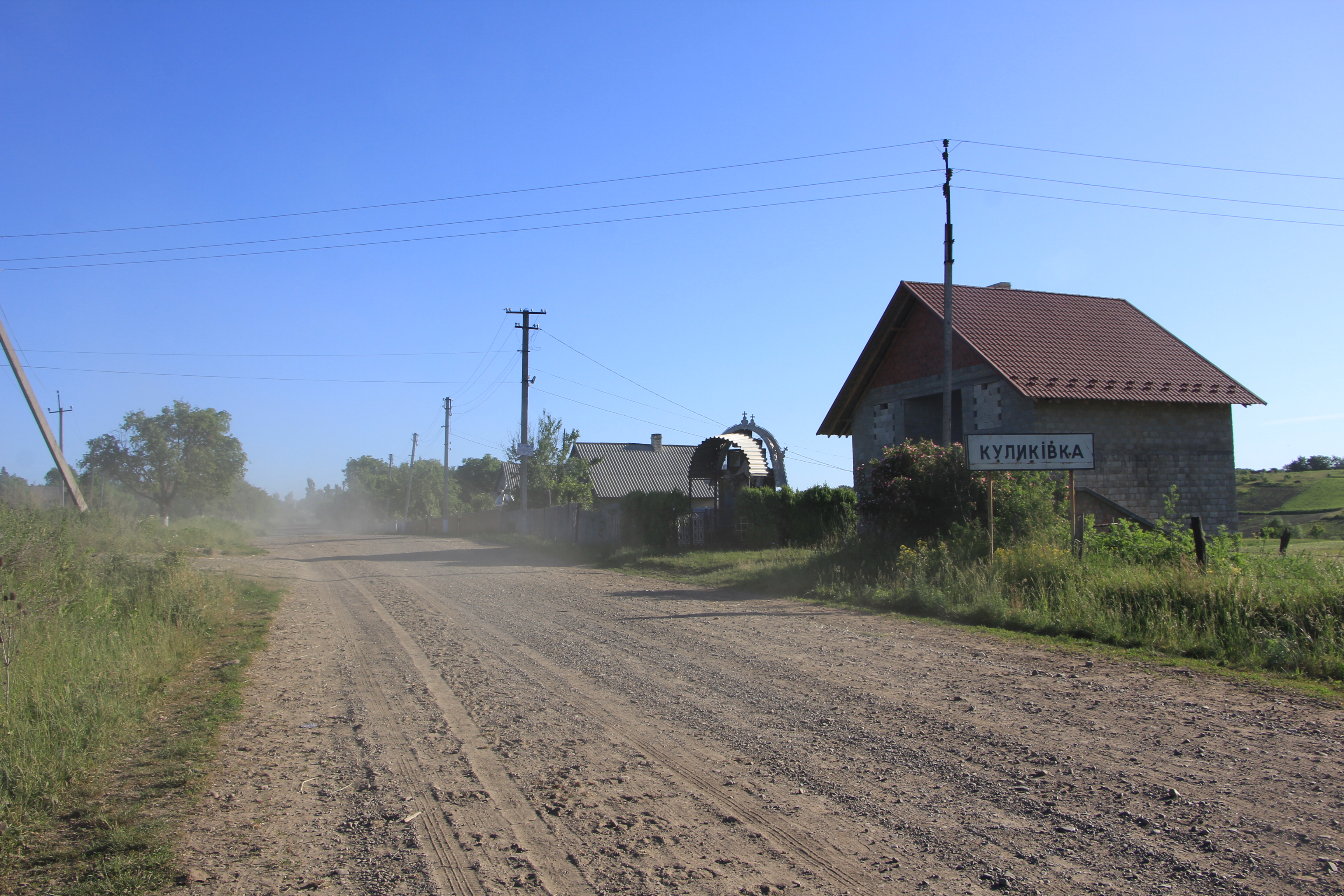 Знак при в'їзді в село Куликівка